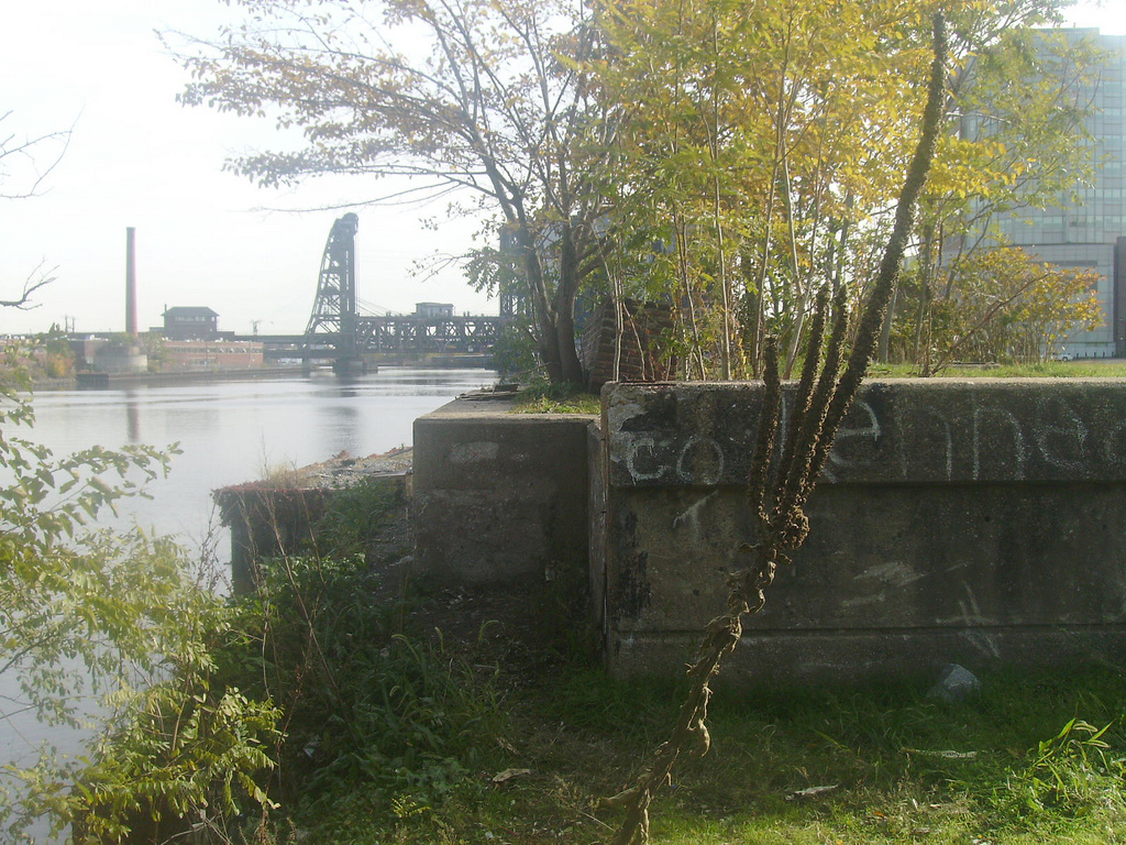 Vivitar